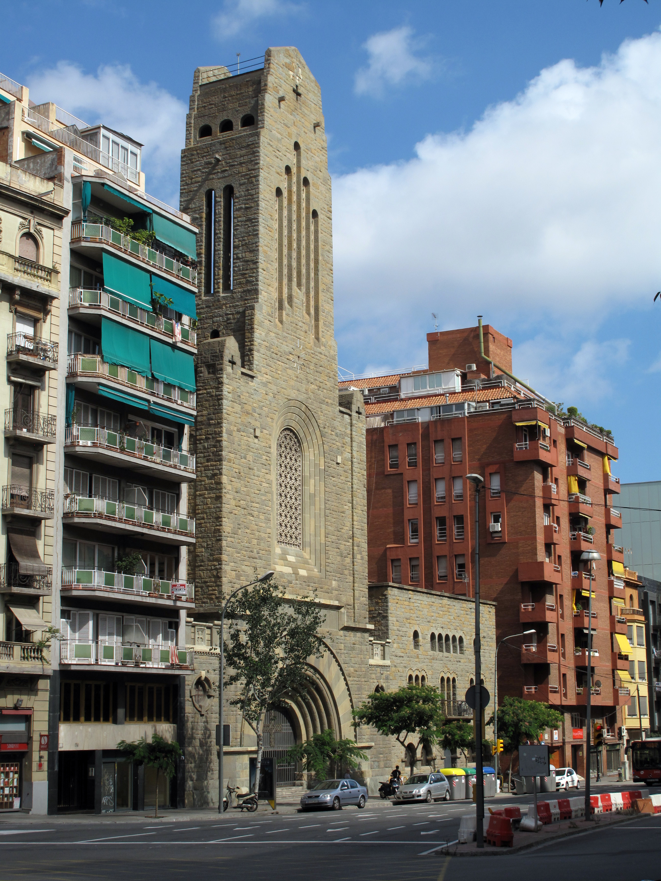 Església de Santa Teresa del Nen Jesús (Barcelona)